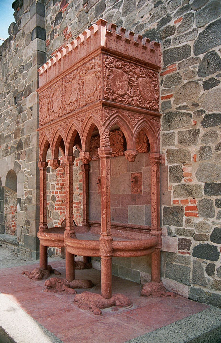 Nach Originalbauteilen rekonstruierter hochgotischer Brunnen im Königsschloß zu Visegrád, Ungarn.